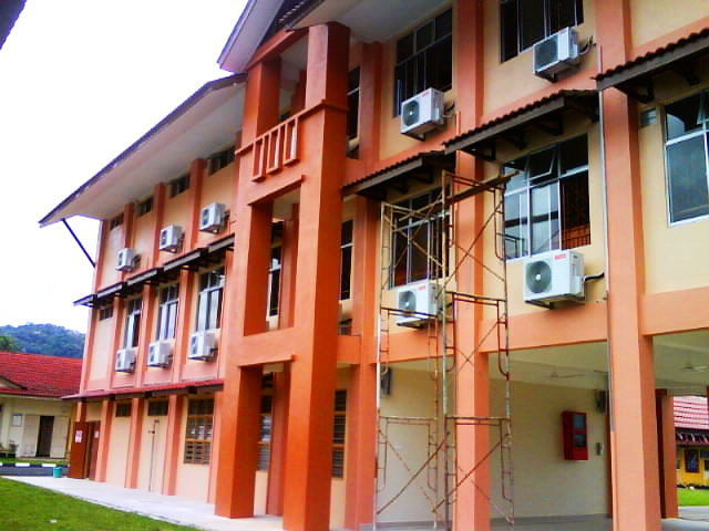 bangunan baru skfs yang belum siap